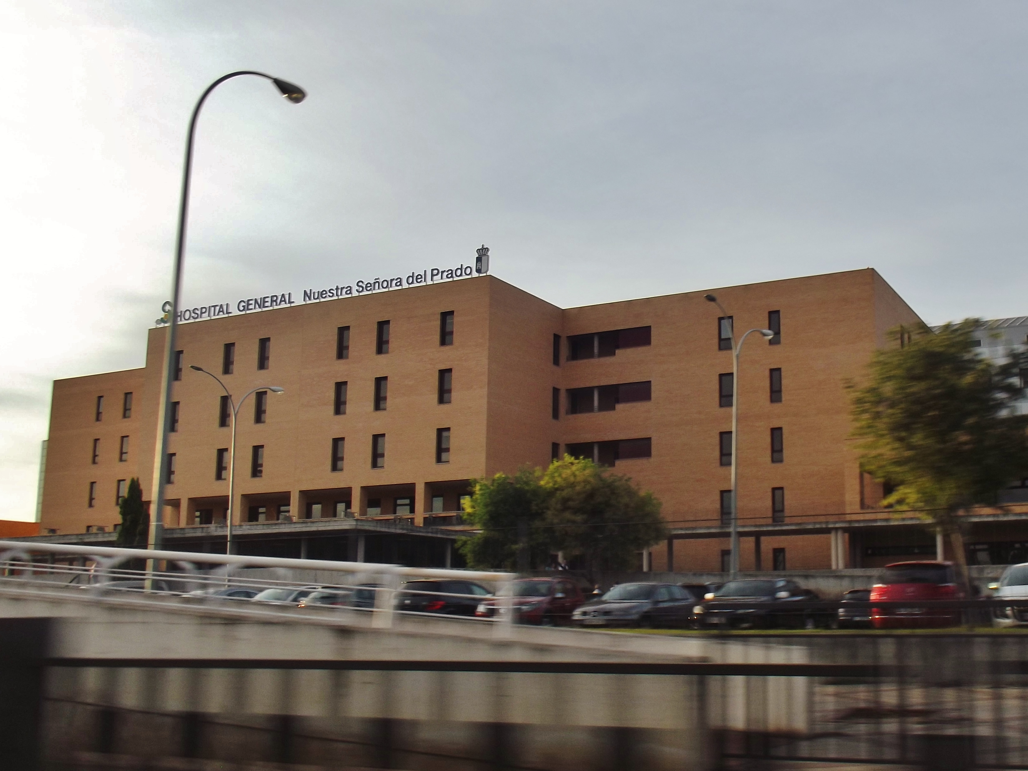 Hospital General Nuestra Señora del Prado de Talavera de la Reina.